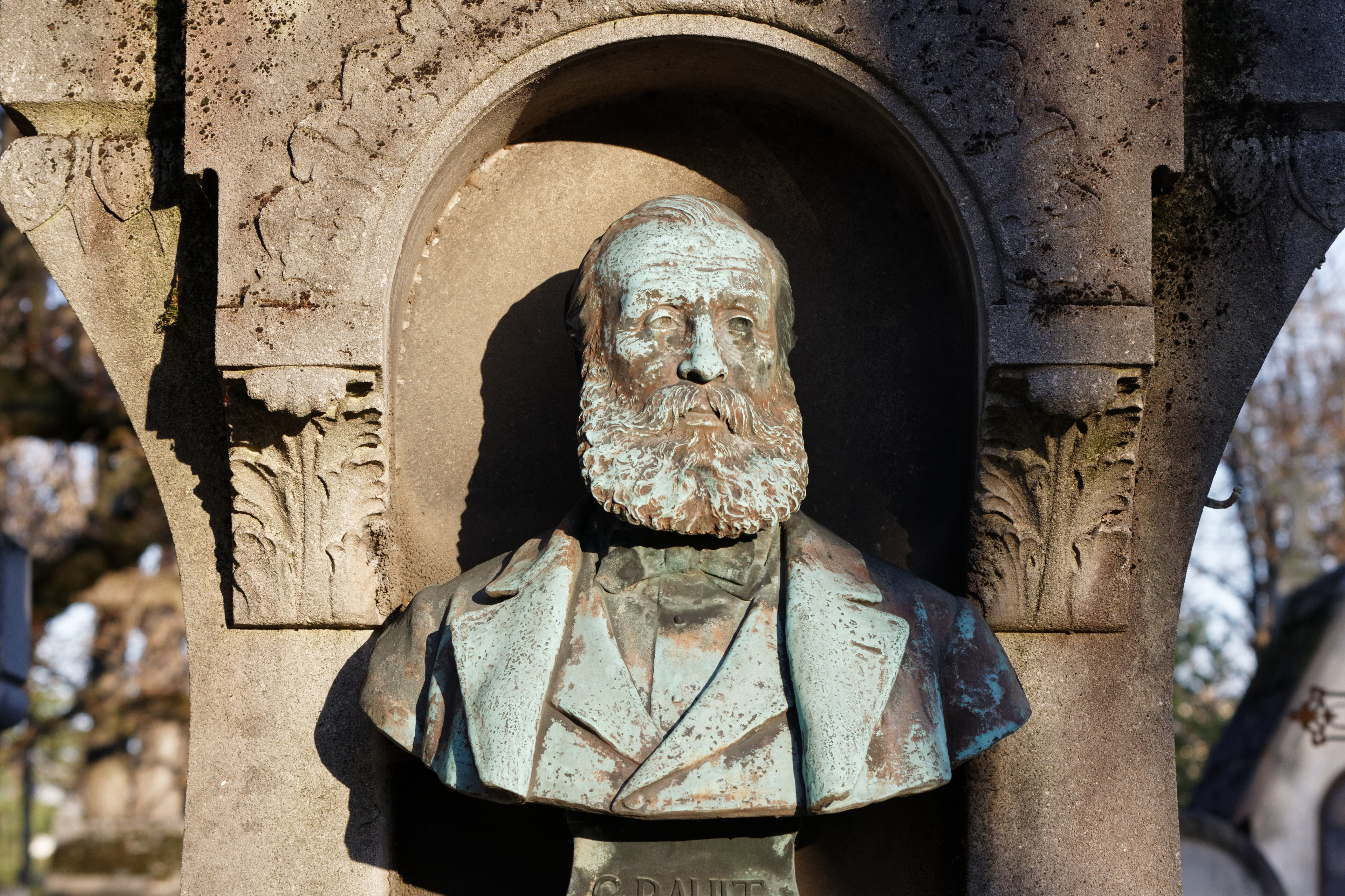 Tombe ornée d'un buste en bronze signé J.-O. Mombur, 1886.